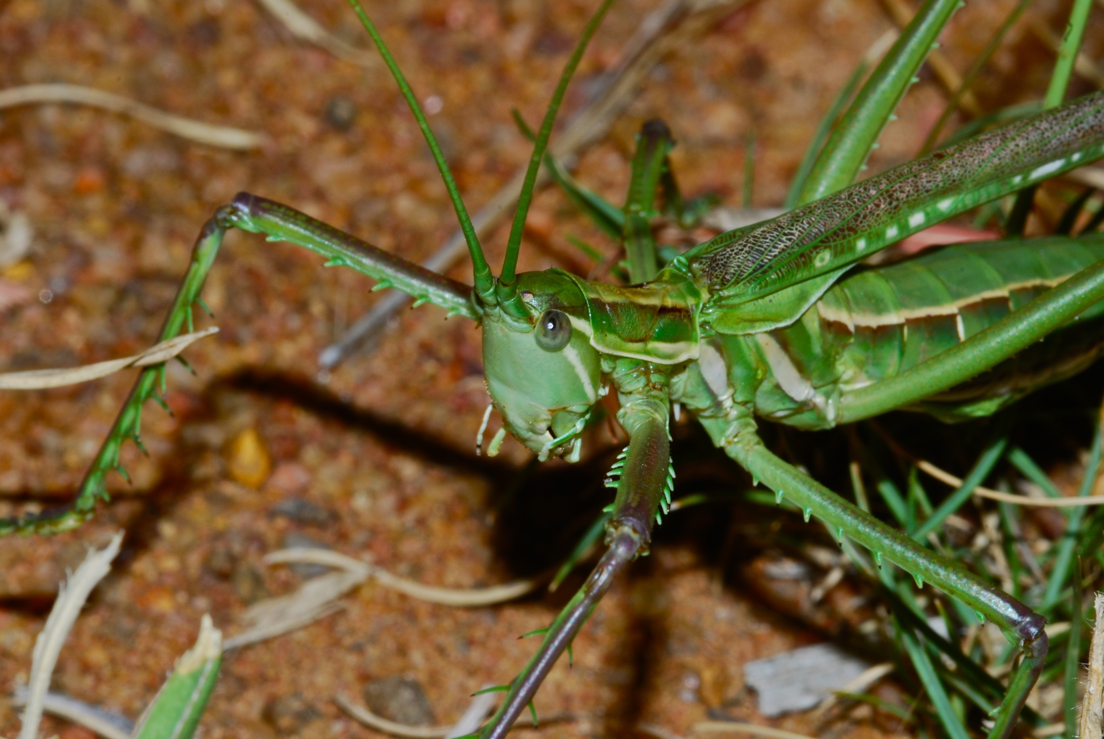 Manyane Resort Walking Trail, Pilanesberg, SOUTH AFRICA